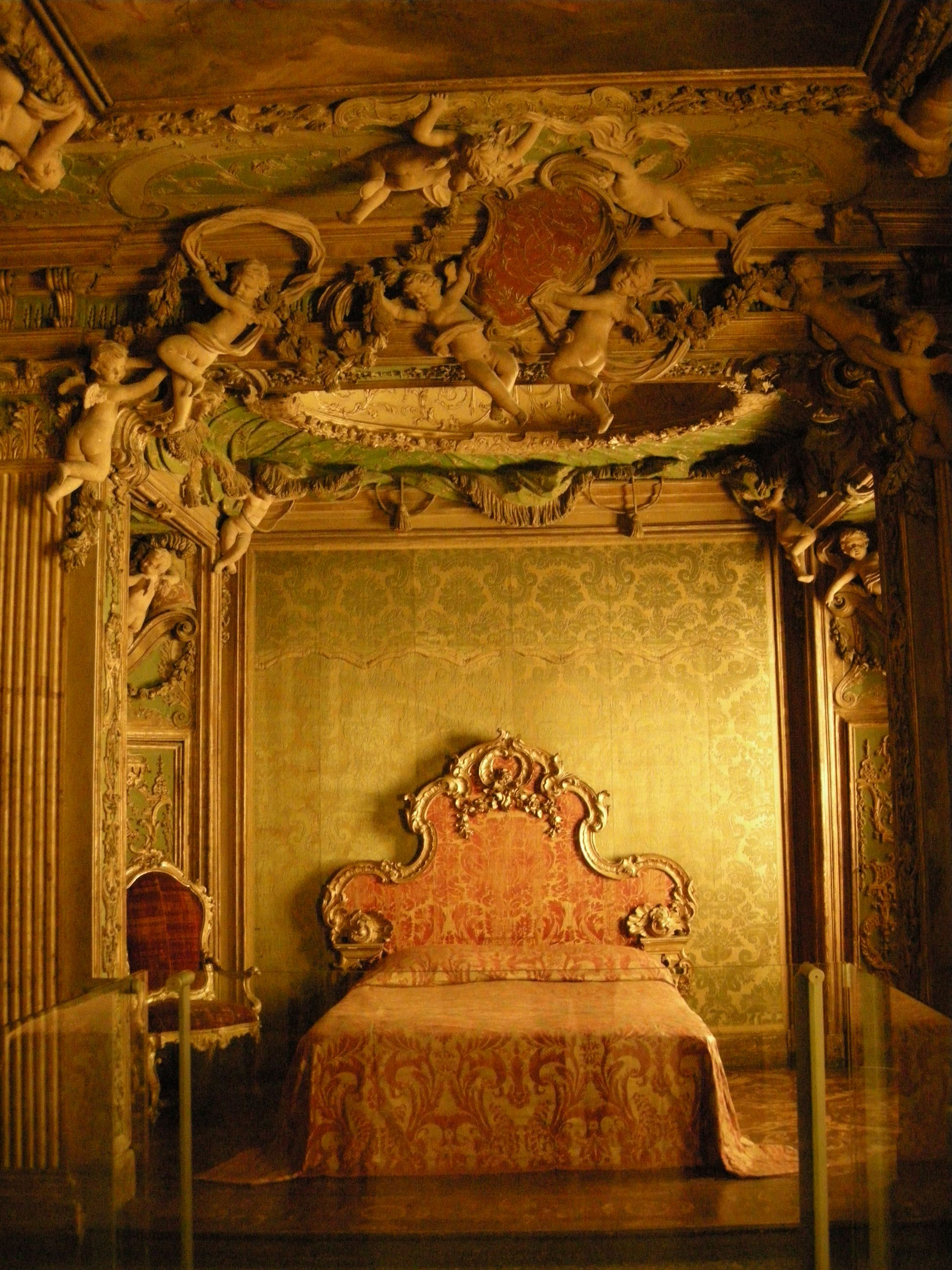 Stanza da letto rococò, proveniente dal Palazzo Sagredo a Venezia, oggi esposta al Metropolitan Museum of arts a New York.